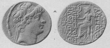 Antíoco X Eusebes Filadelfo